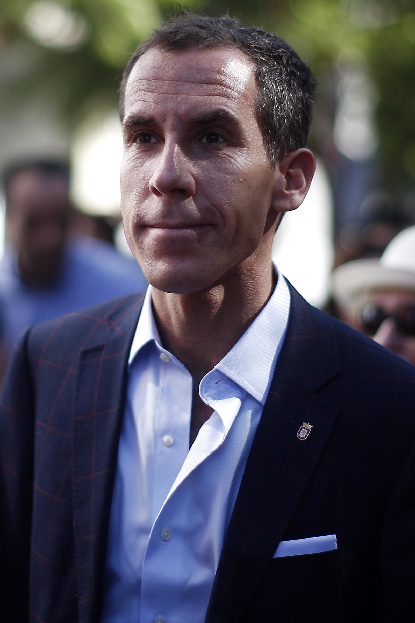 Celebración Aniversario de la Fundación de Santiago